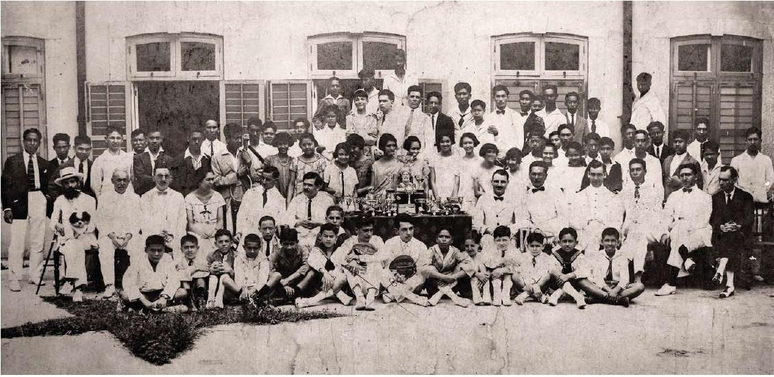 Viagem apartir de uma fotografia de António Conceição